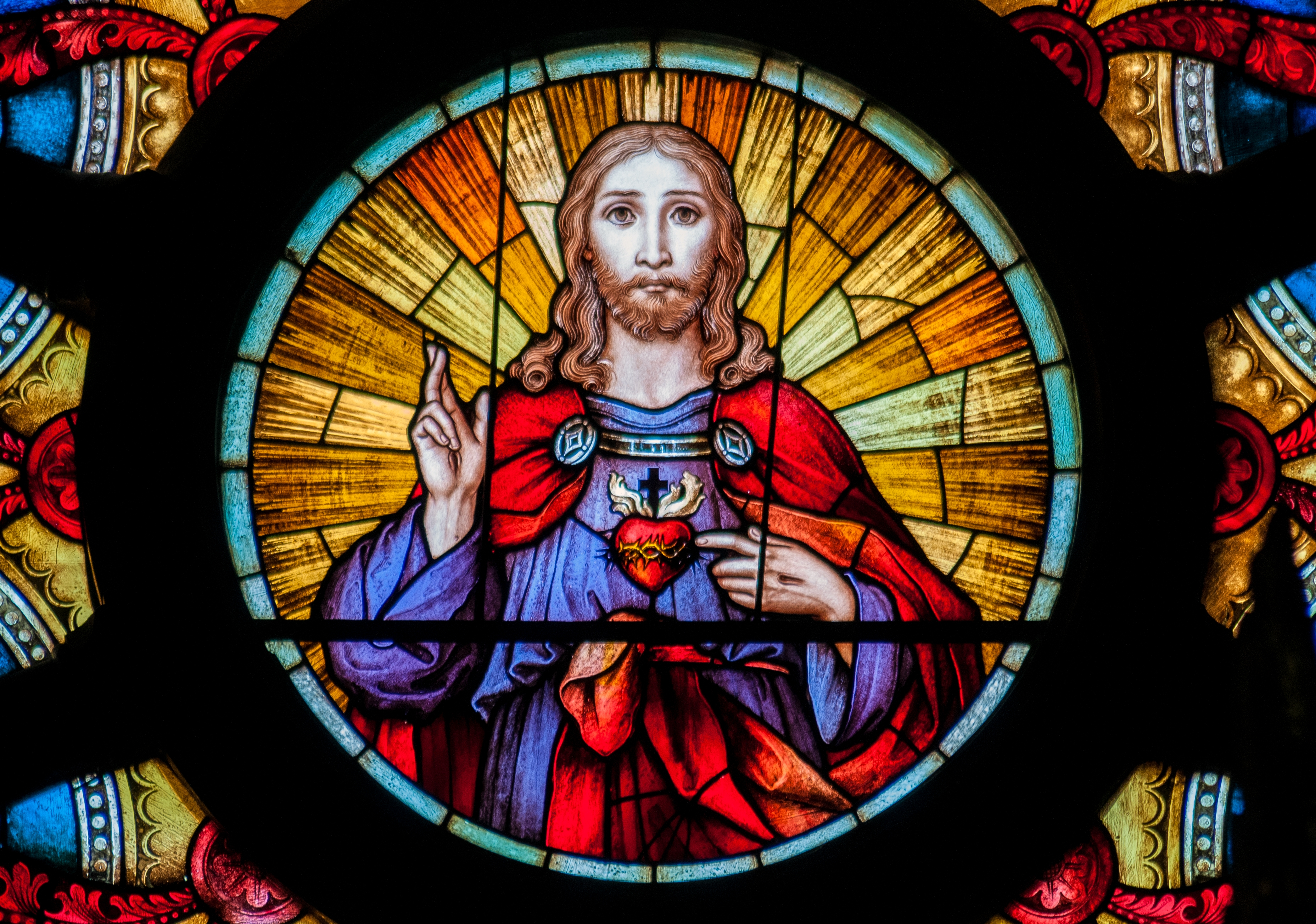 Vitral em Igreja Santa Efigenia